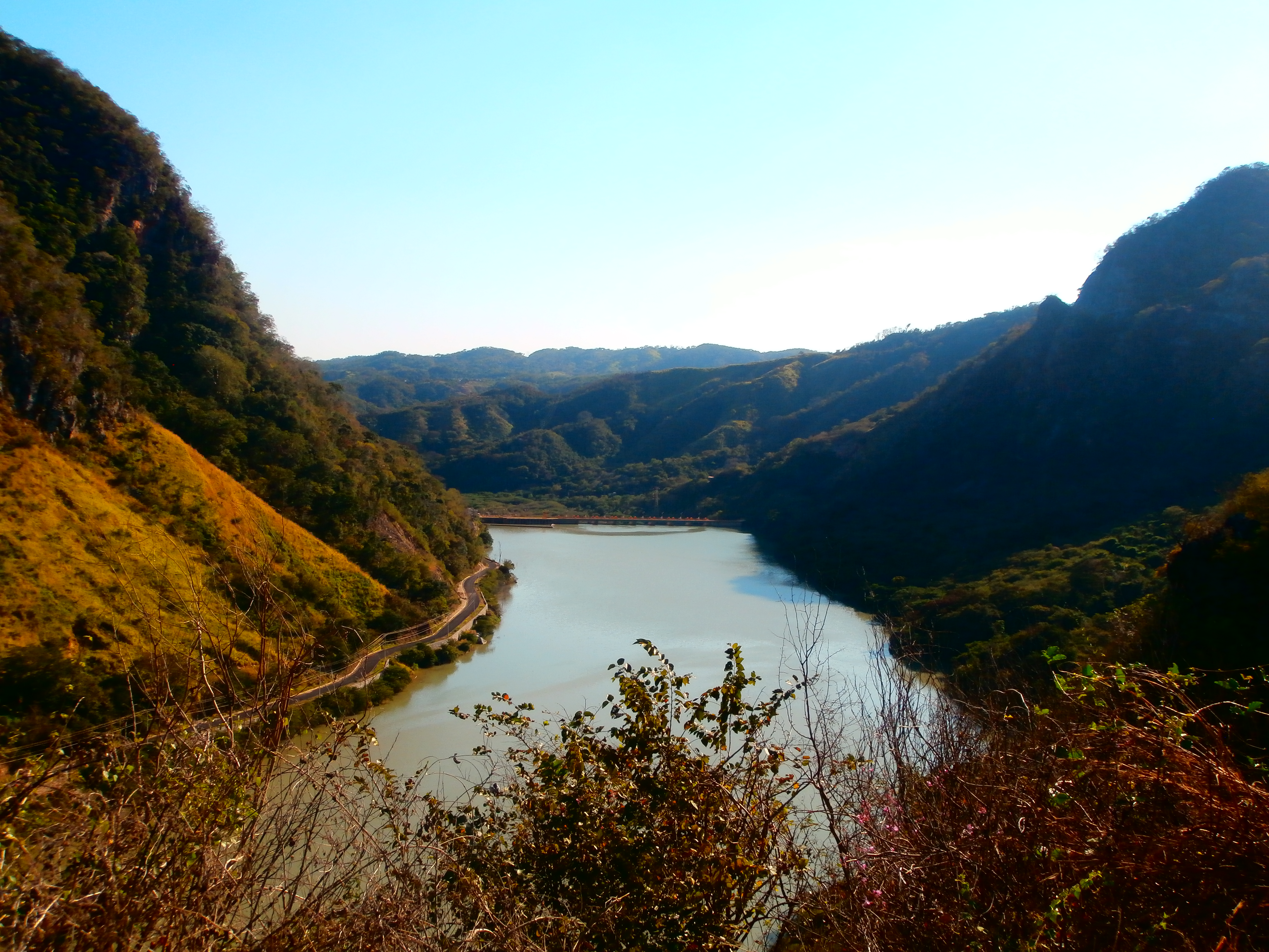 Central Hidroelectrica General Ambrosio Figueroa (La Venta)